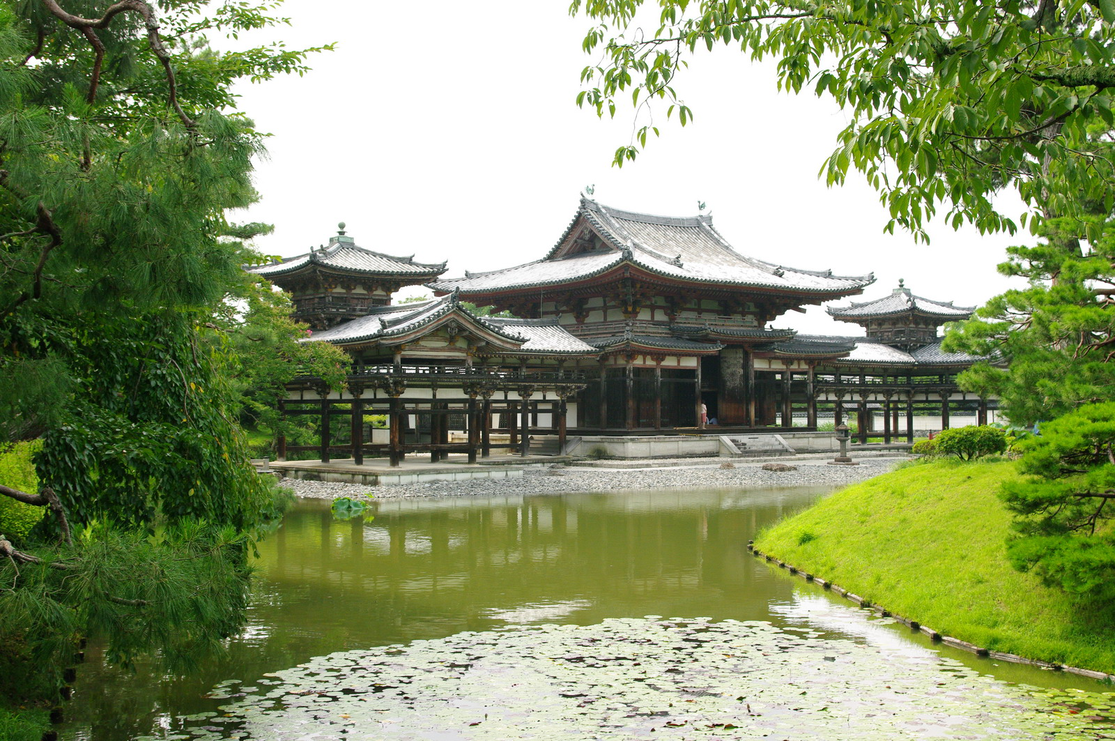 Byodoin-Tempel, Phönix-Halle